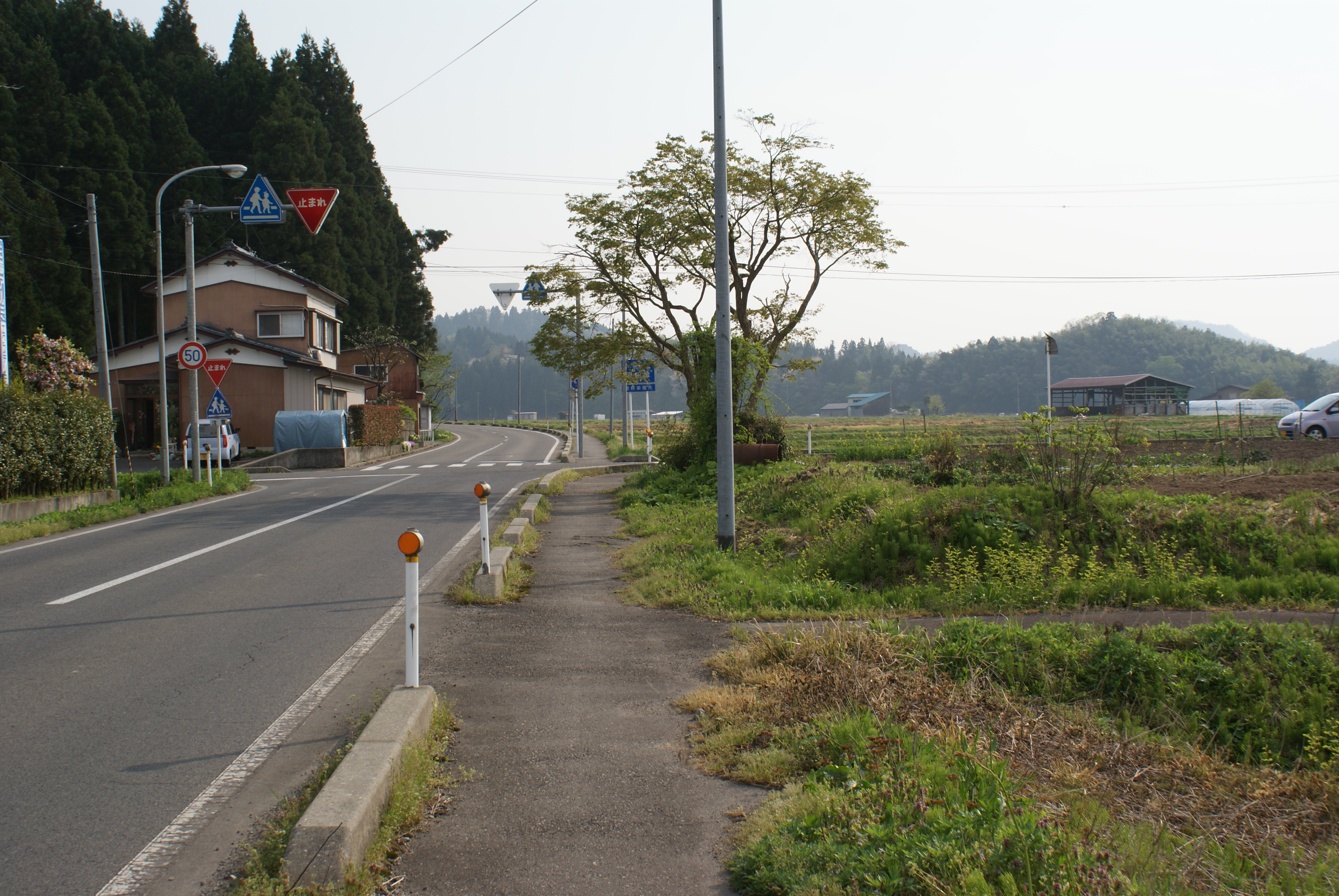 旧蒲原鉄道寺田駅跡。